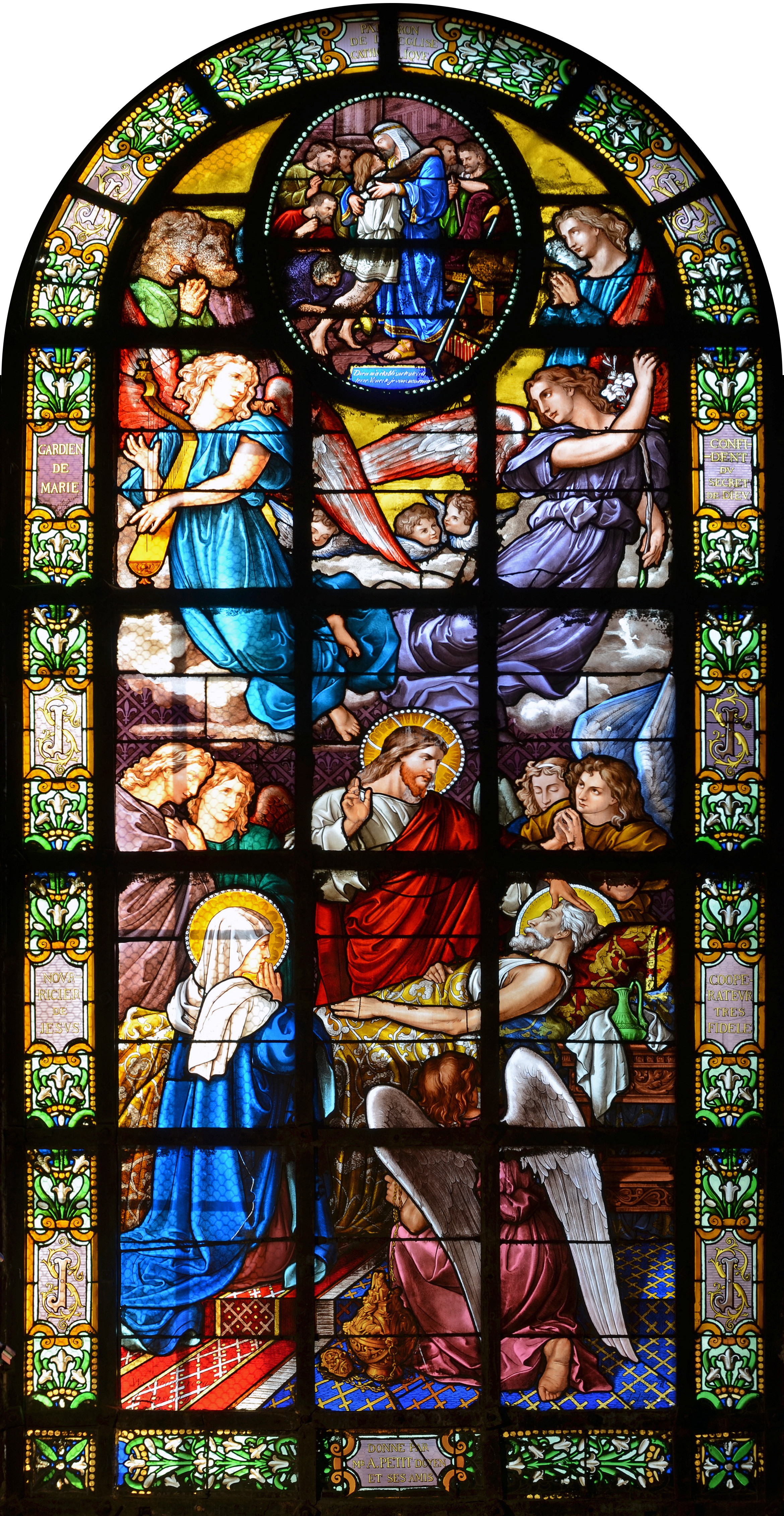 Vitrail représentant La mort de saint Joseph par l'atelier d'Antoine Lusson d'après un carton de William Bouguereau